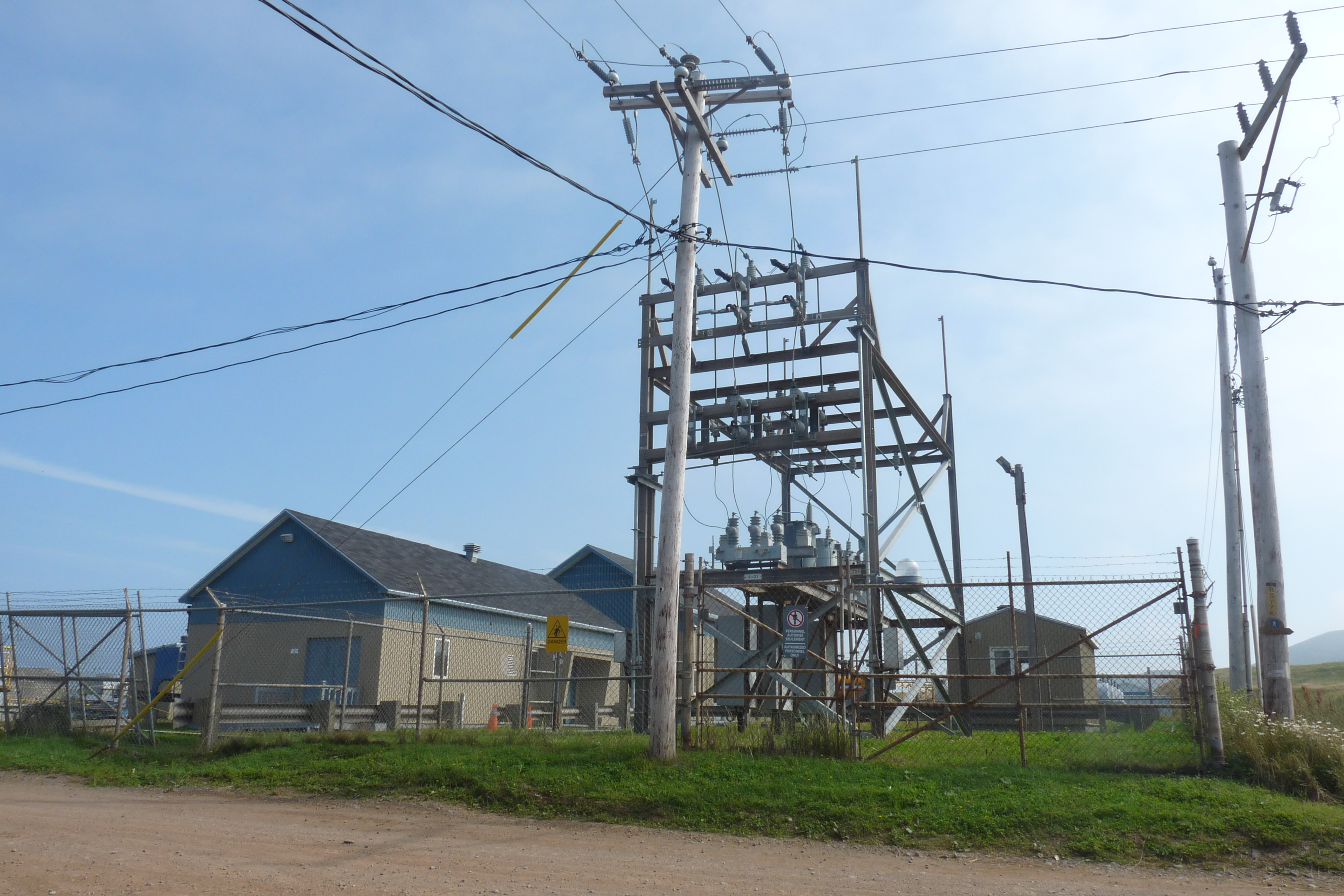 Arrière de l'édifice de la station thermique de l'île d'Entrée